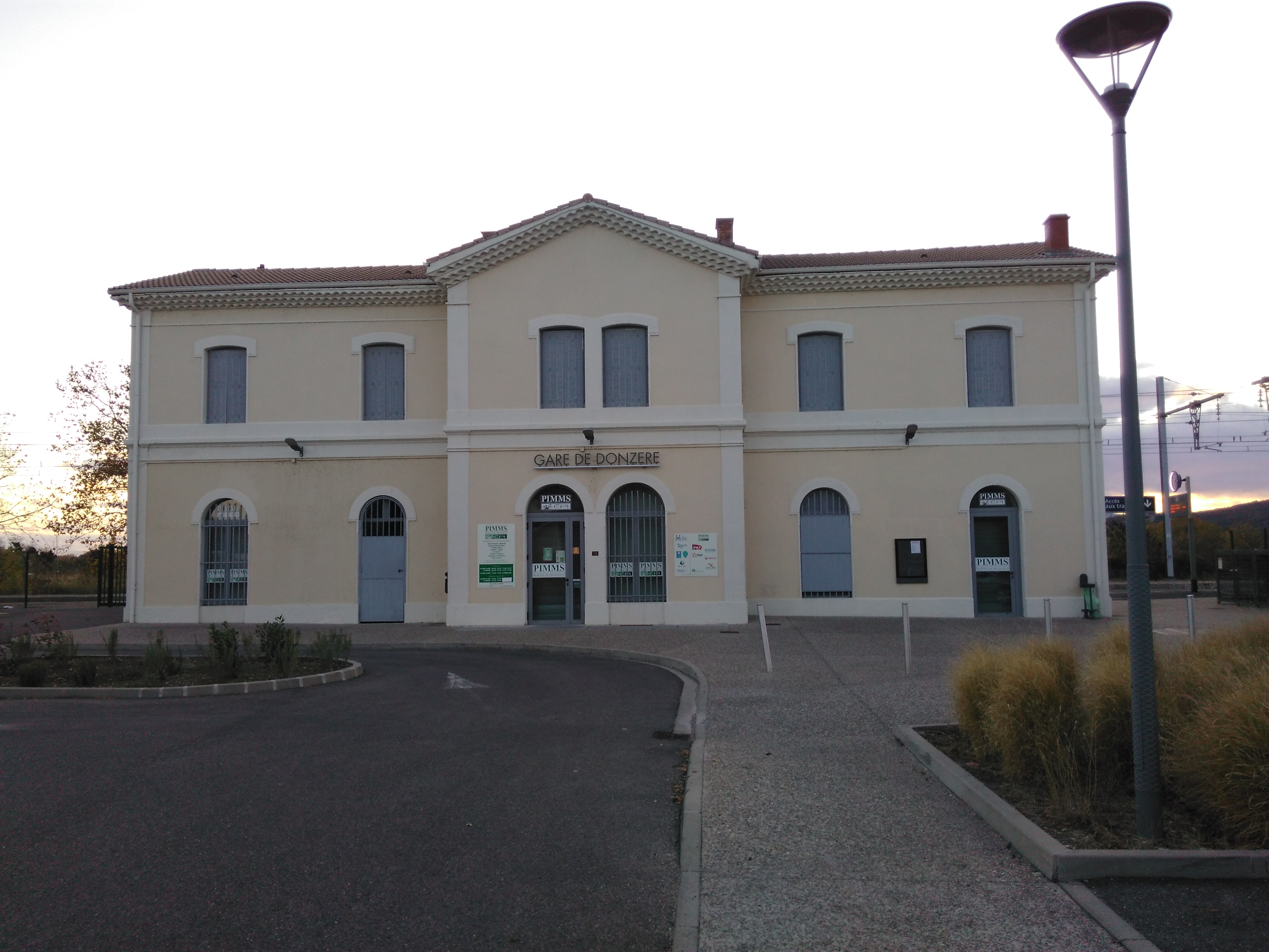 Bâtiment voyageurs de la gare de Donzère, département de la Drôme, France.